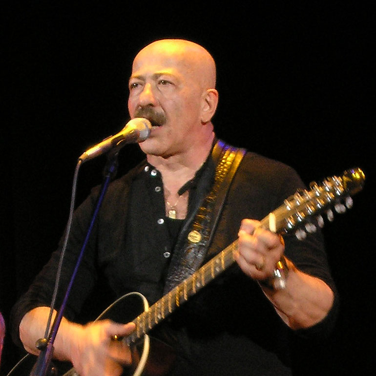 Александр Яковлевич Розенбаум Alexander Rosenbaum